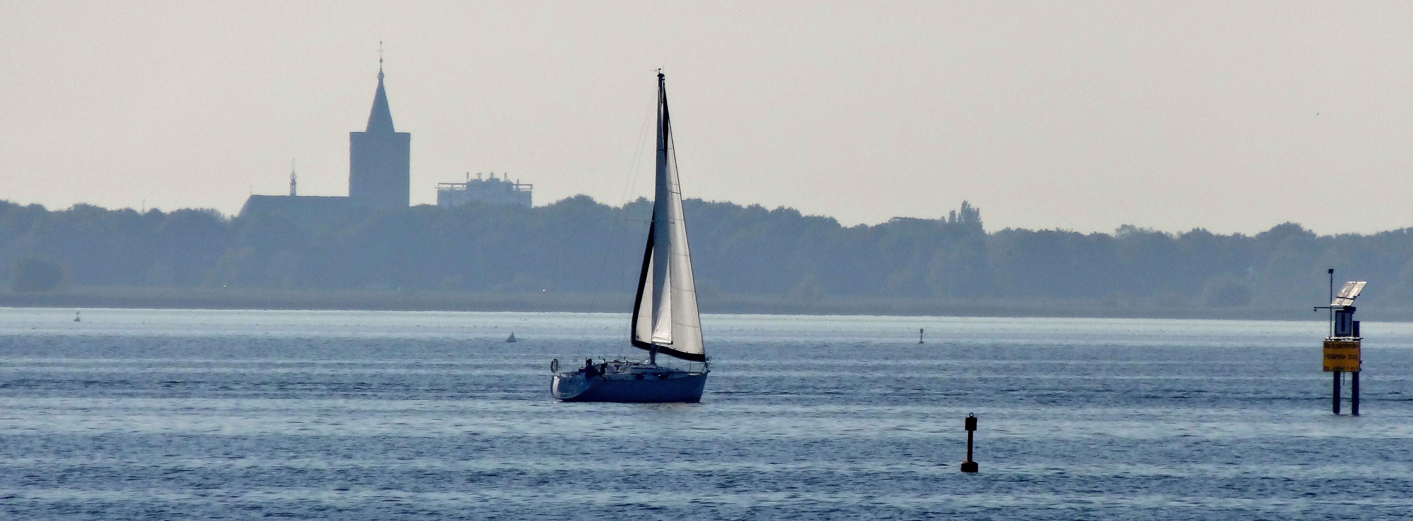 Gooimeer gezien vanuit Almere Havenmet, aan de overzijde de kerktoren van Naarden